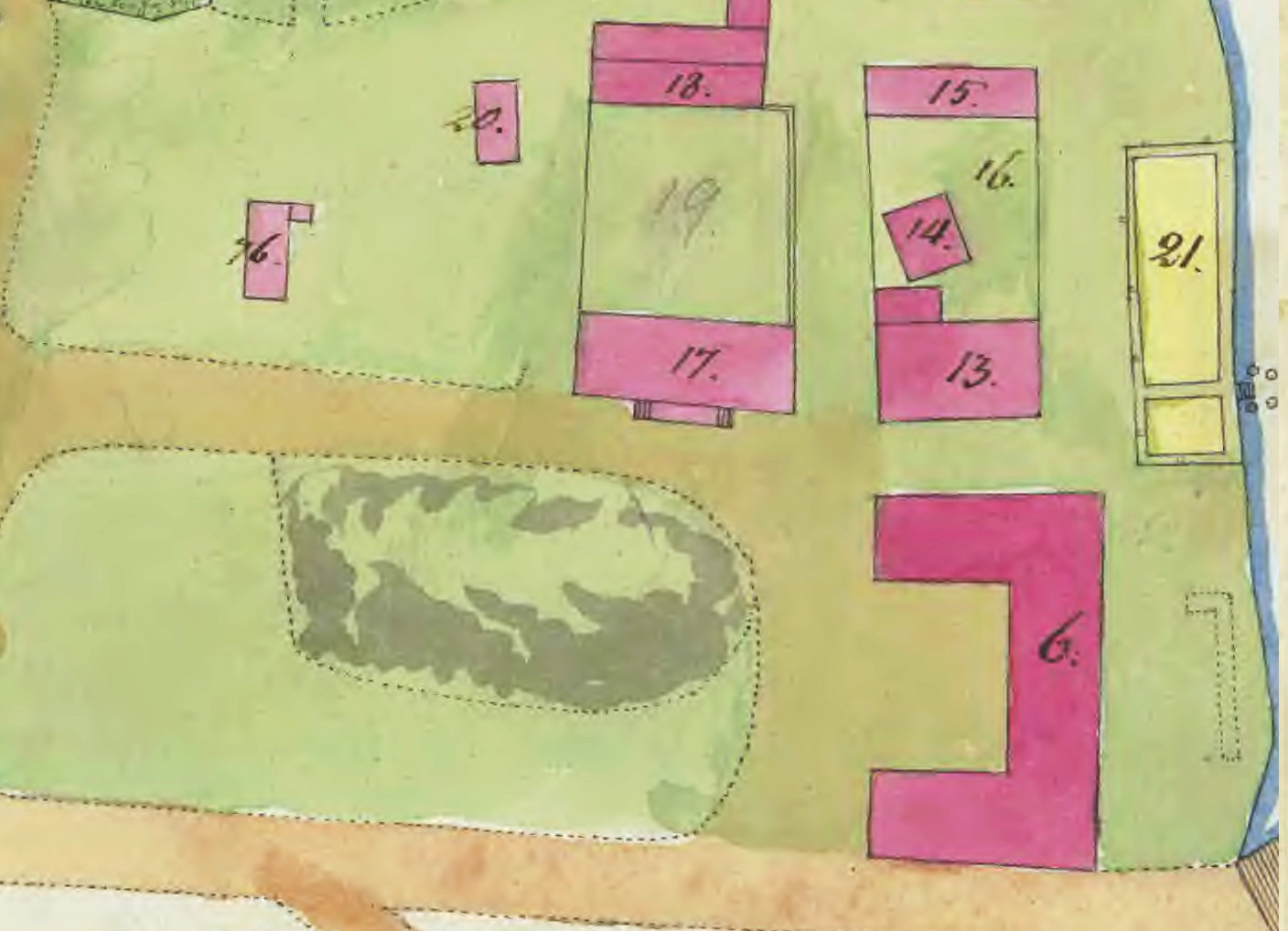 Del av karta över Drottningholmsmalmen 1815 med Stenvärdshuset (13), Trävärdshuset (17) och Hertigarnas stall (6).